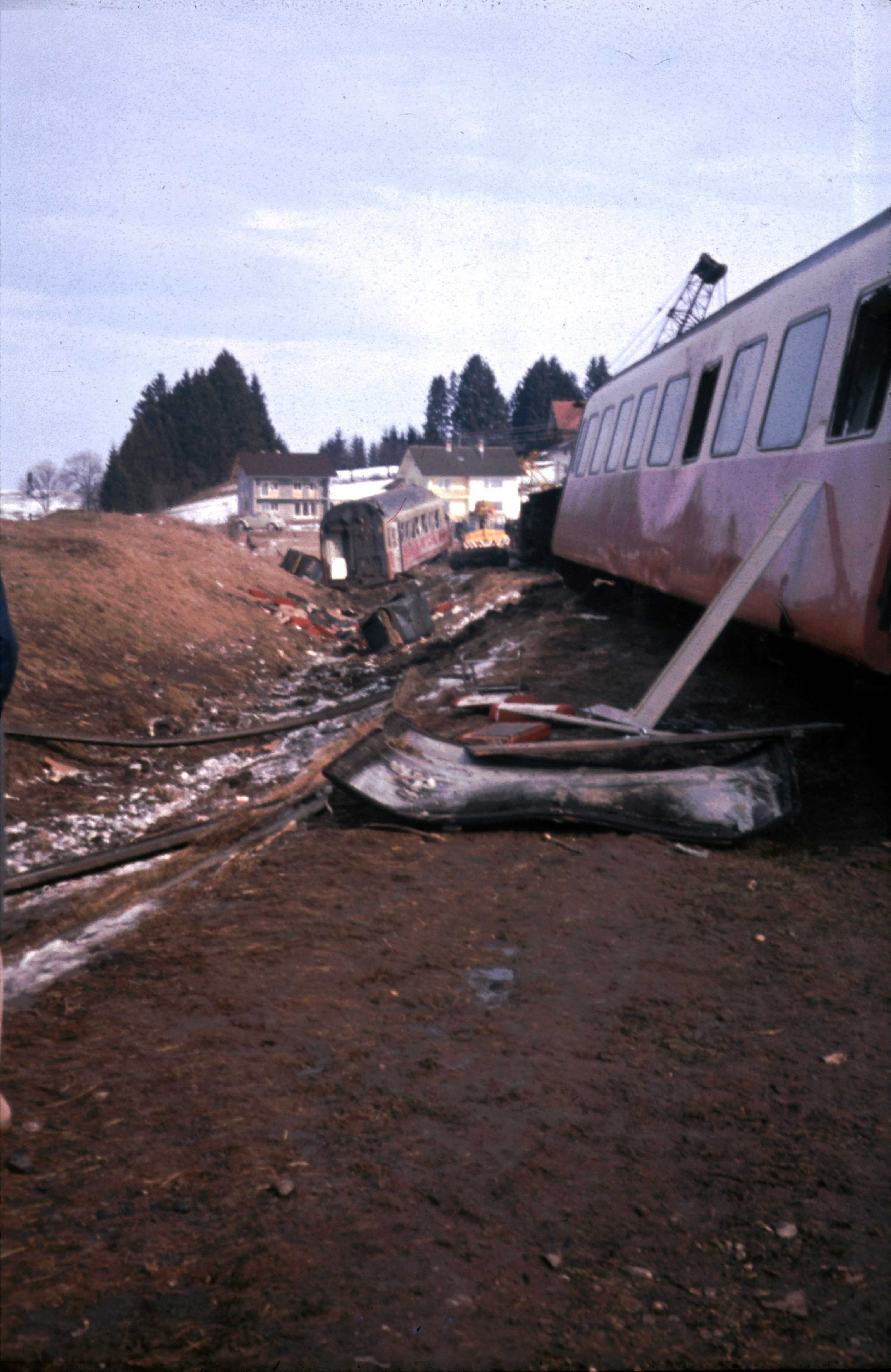 Zugunglück von Aitrang, Bergungsarbeiten, Wagen